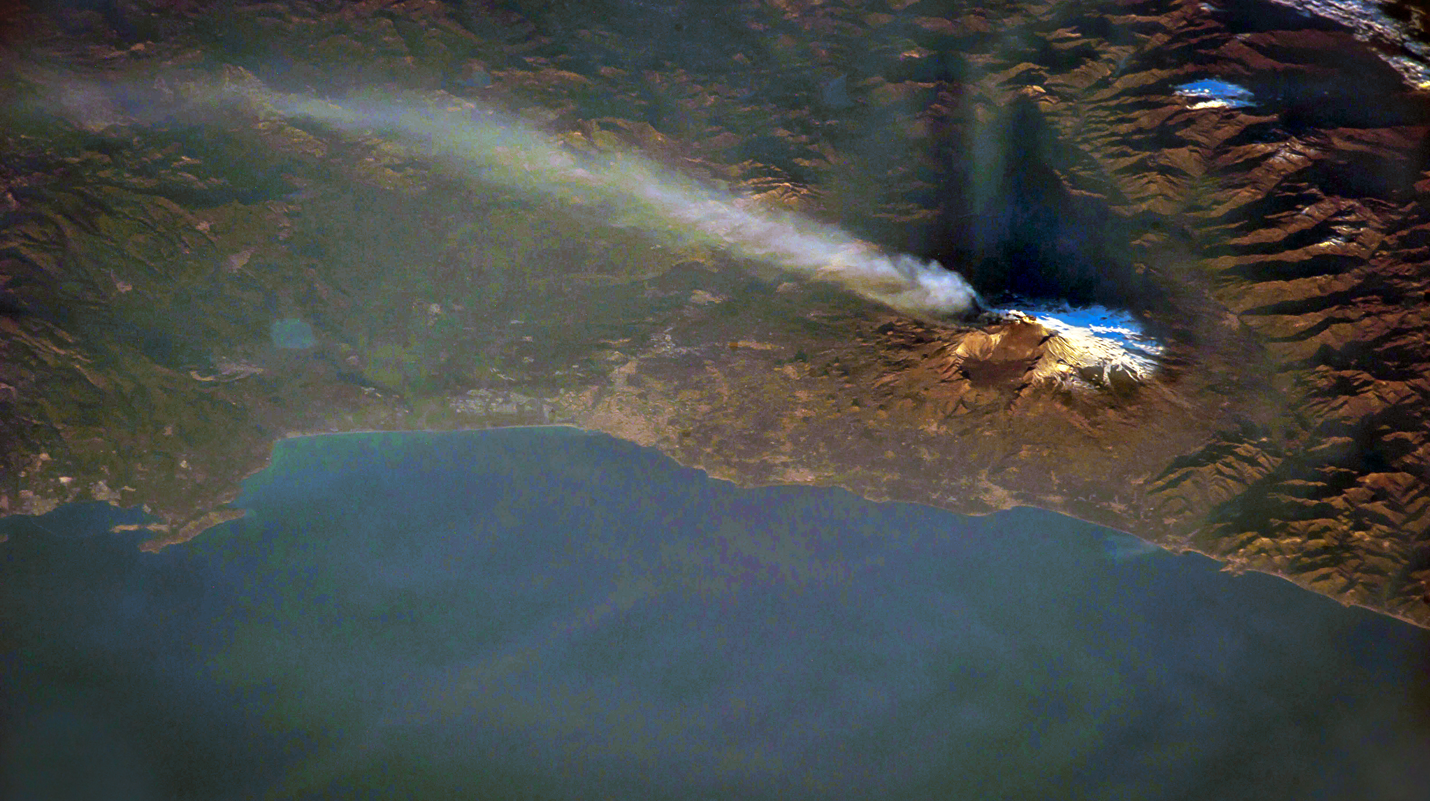 Mount Etna - Italy 17 Mar 2017 / 05:33 GMT ISS050-E-57727